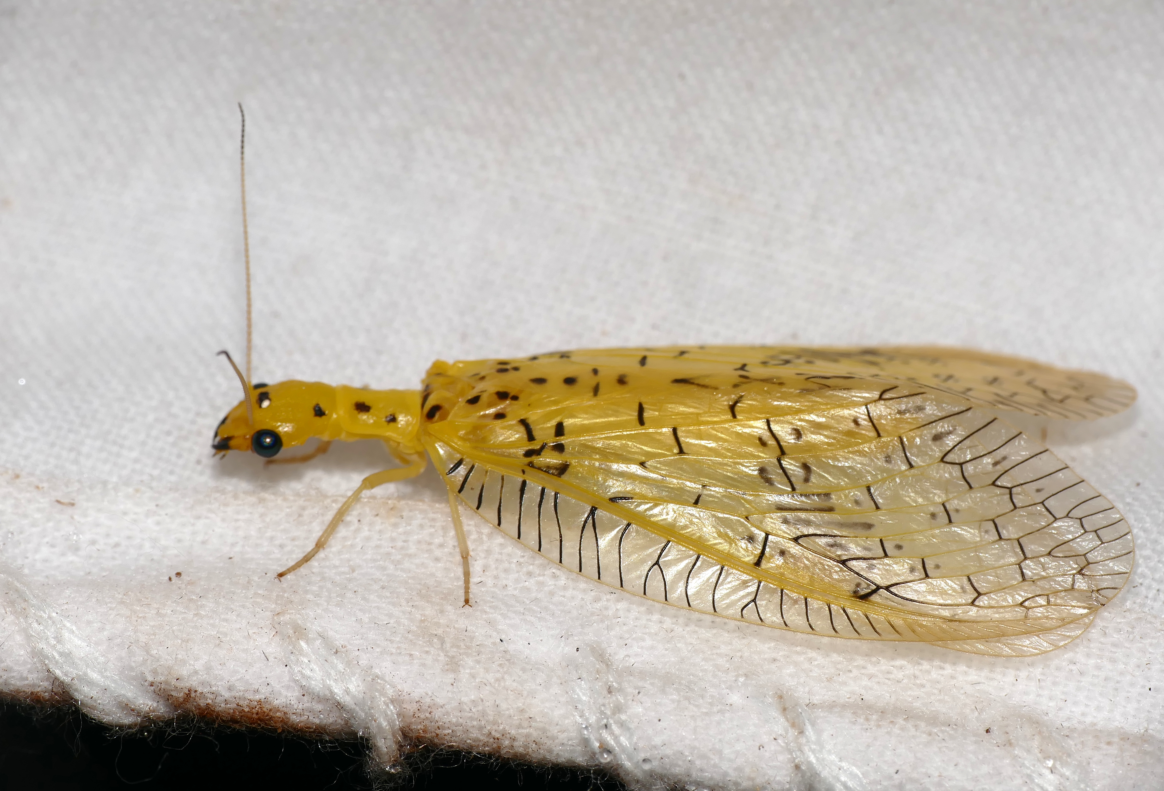 Piste de Belizon, Roura, French Guyana, FRANCE